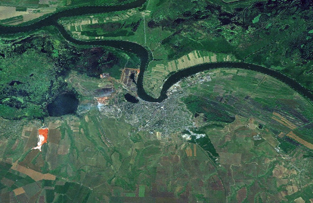 Tulcea vazuta din spatiu